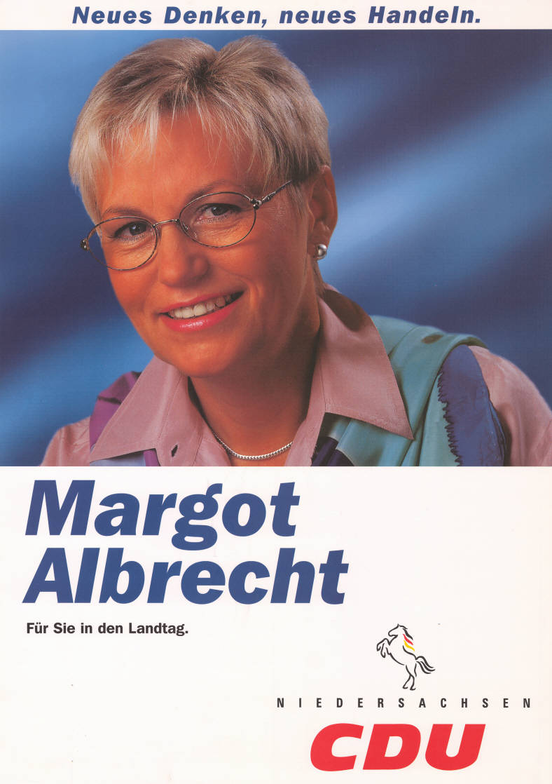 Neues Denken, neues Handeln. Margot Albrecht Für Sie in den Landtag. Niedersachsen CDUAbbildung:Porträtfoto - Niedersachsenross mit NationalfarbenPlakatart:Kandidaten-/Personenplakat mit PorträtAuftraggeber:CDU NiedersachsenObjekt-Signatur:10-008 : 1130Bestand:Landtagswahlplakate Niedersachsen (10-008)GliederungBestand10-18:Landtagswahlplakate Niedersachsen (10-008) » CDULizenz:KAS/ACDP 10-008 : 1130 CC-BY-SA 3.0 DE